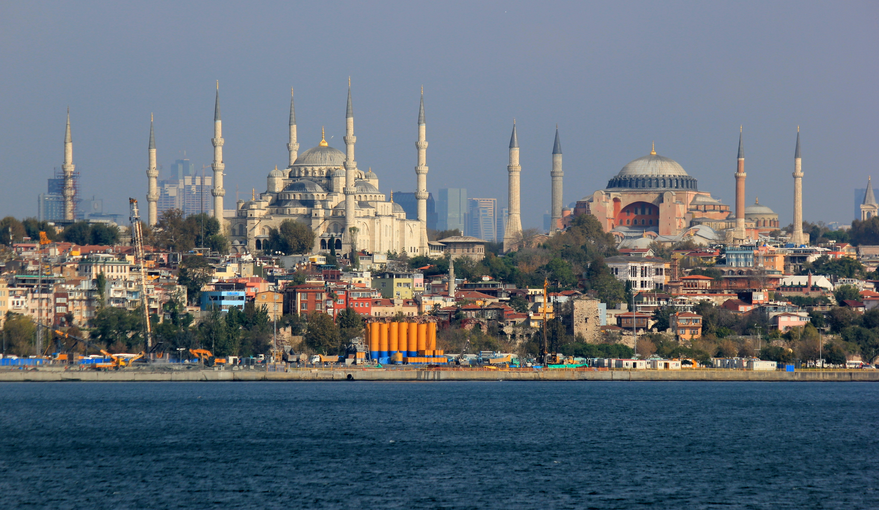 Blick auf Hagia Sophia und Sultan-Ahmed-Moschee in Istanbul.